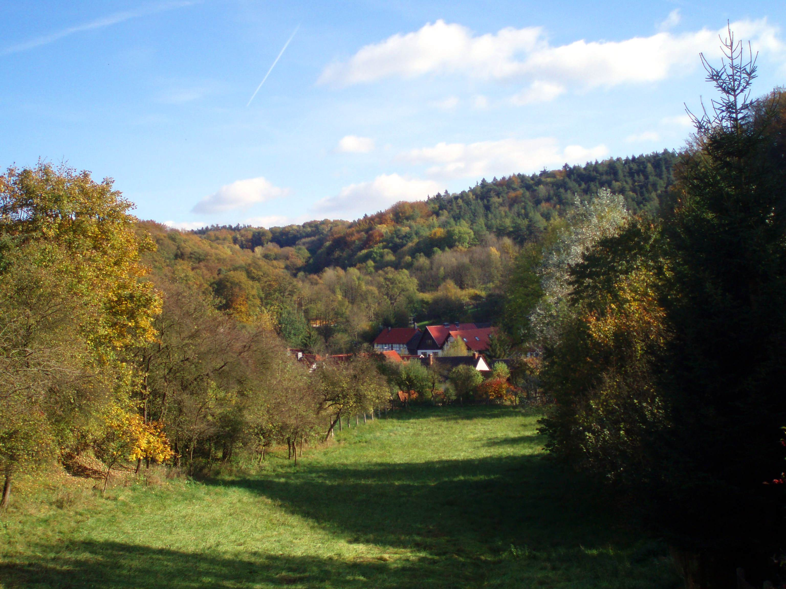 Rüdigsdorfer Schweiz